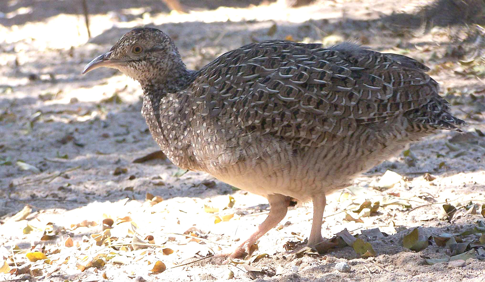 Nothoprocta cinerascens